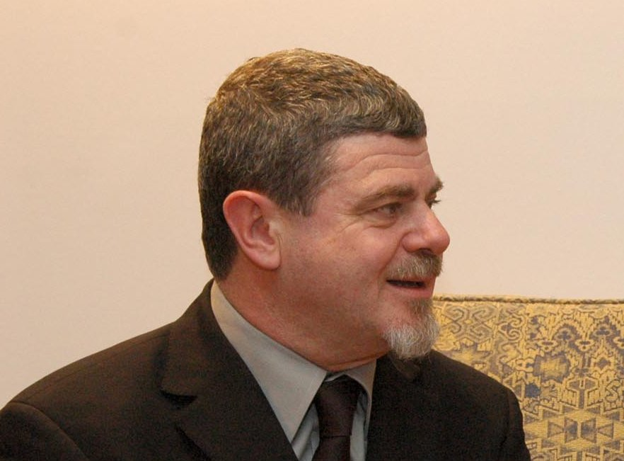 Gustavo Santaolalla. En Casa Rosada, con la primera dama y senadora Cristina Fernández de Kirchner quien no aparece en este fragmento de la foto